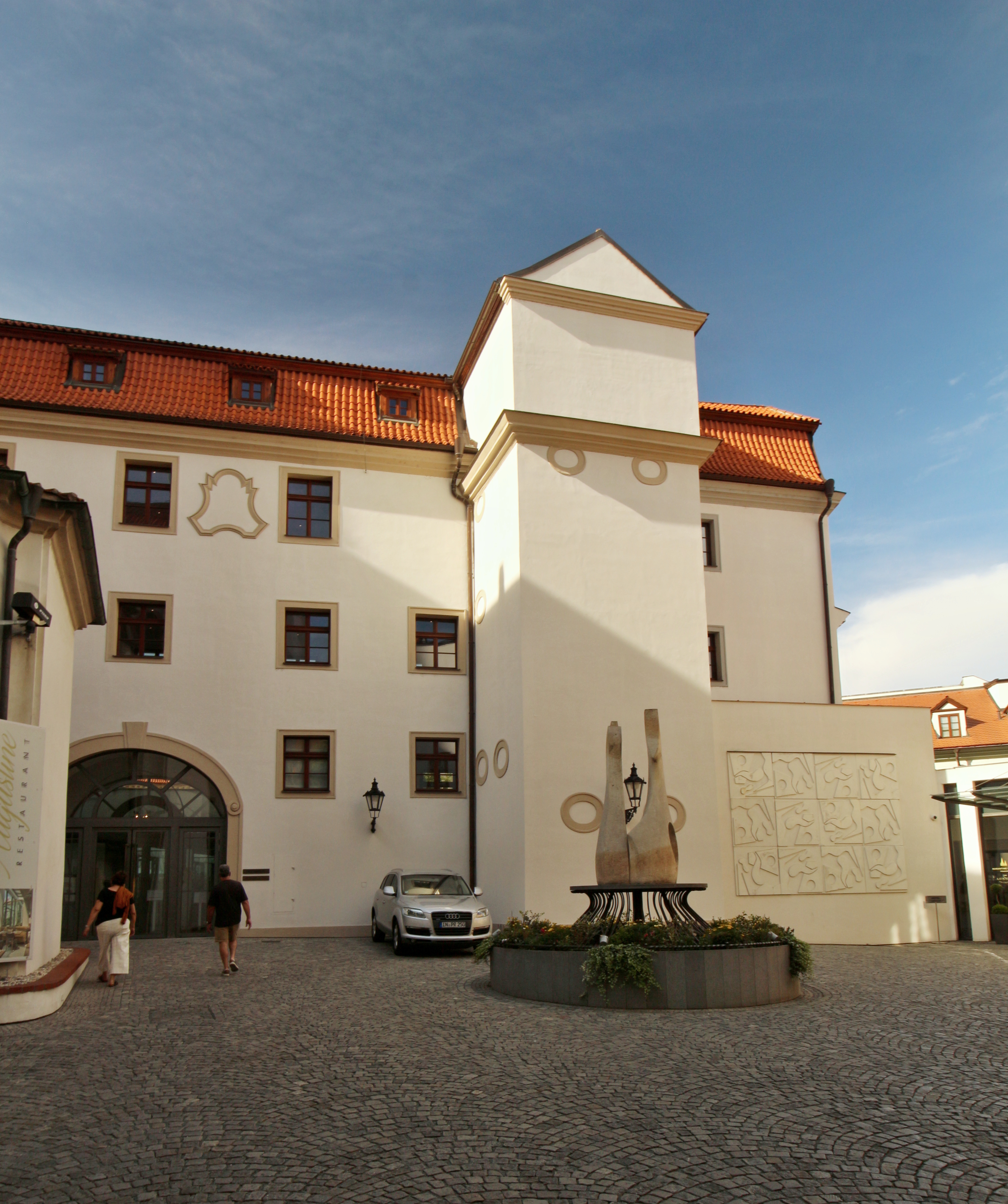 Malá Strana, klášter augustiniánů u sv. Tomáše